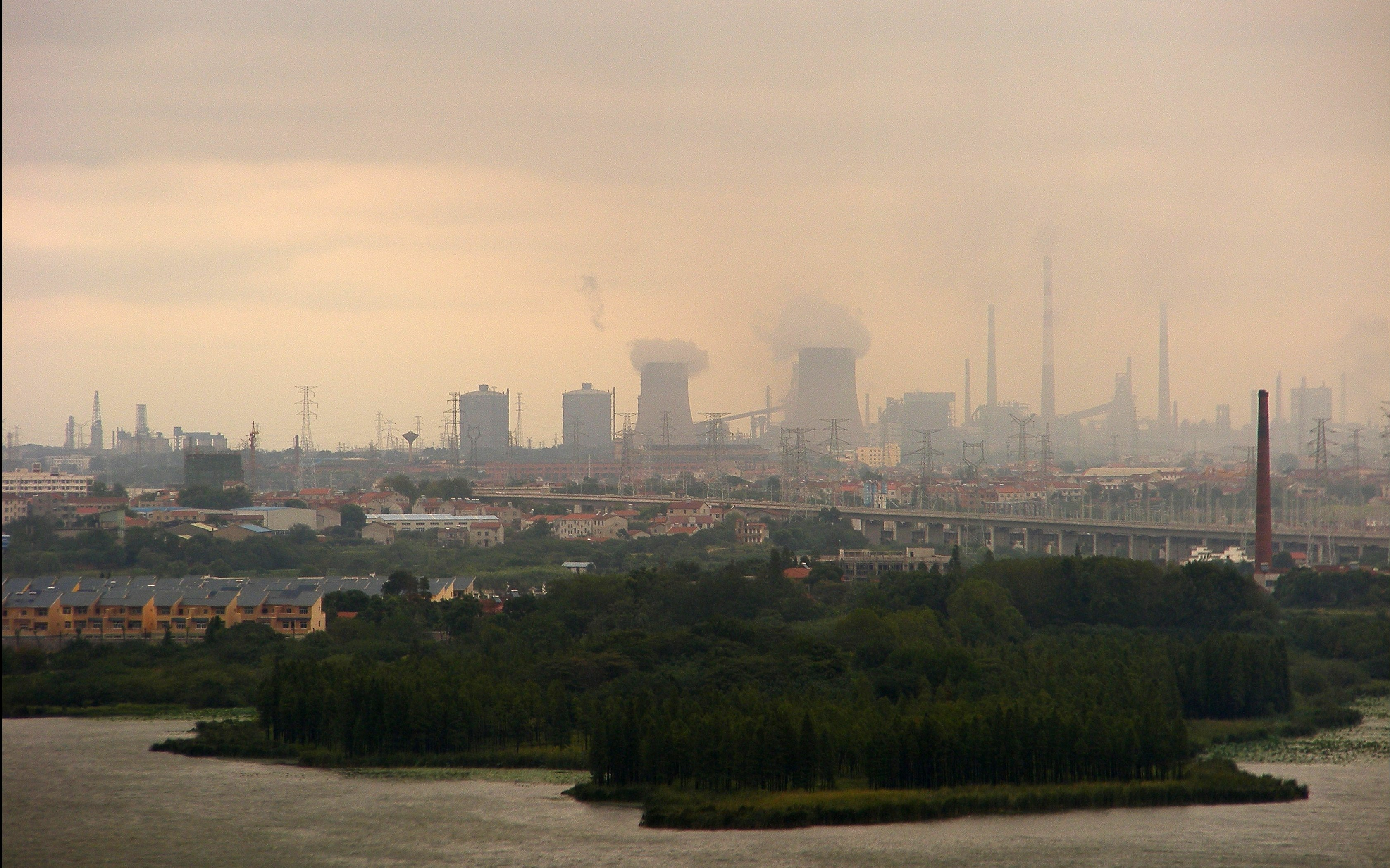 East lake and Steel mill